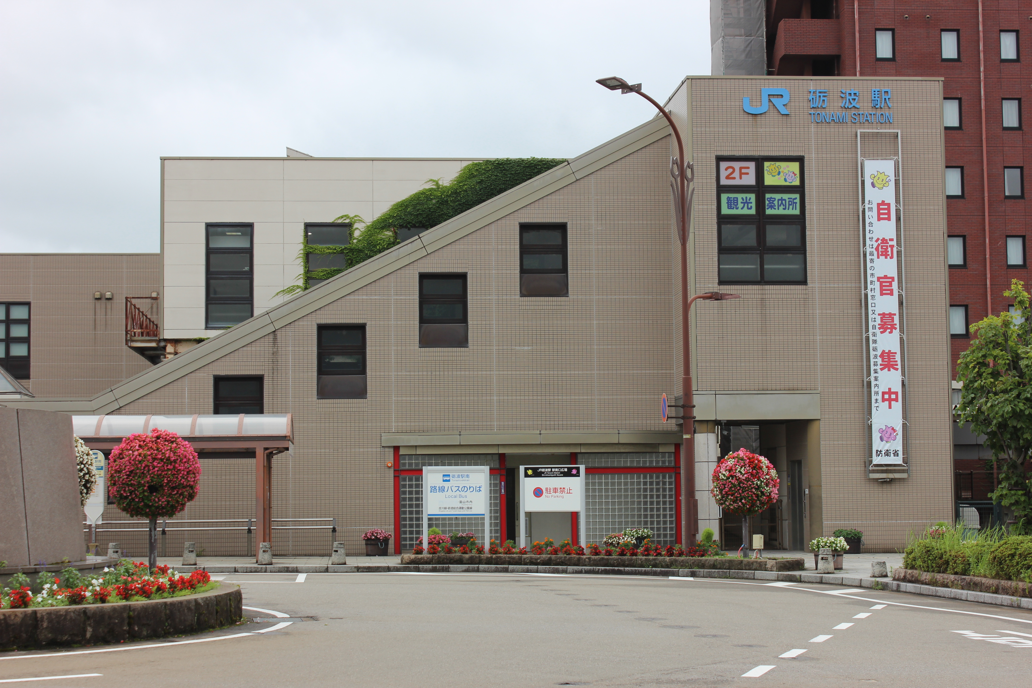 砺波駅（南口） Canon EOS Kiss X5